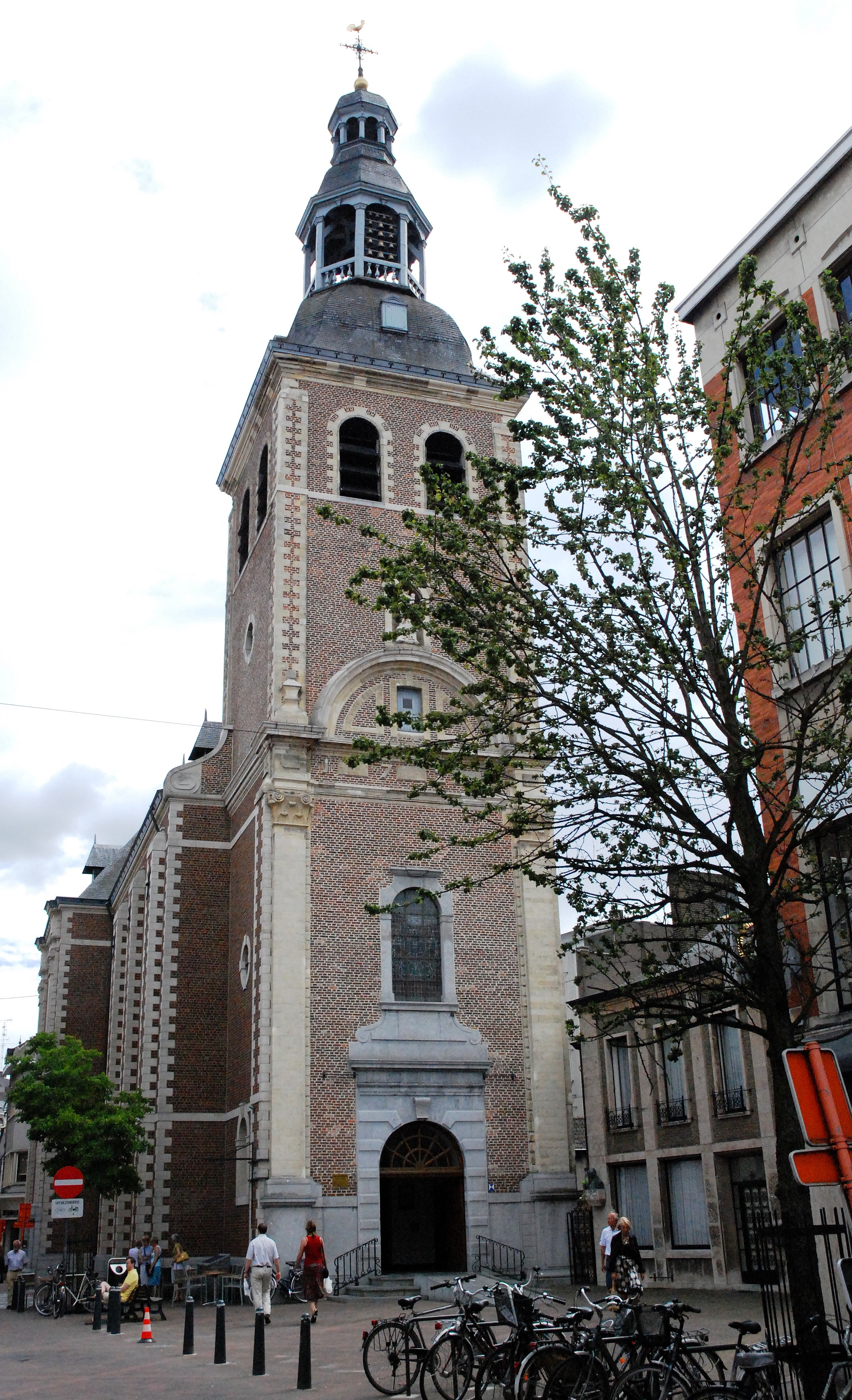 Virga-Jessebasiliek in Hasselt, België